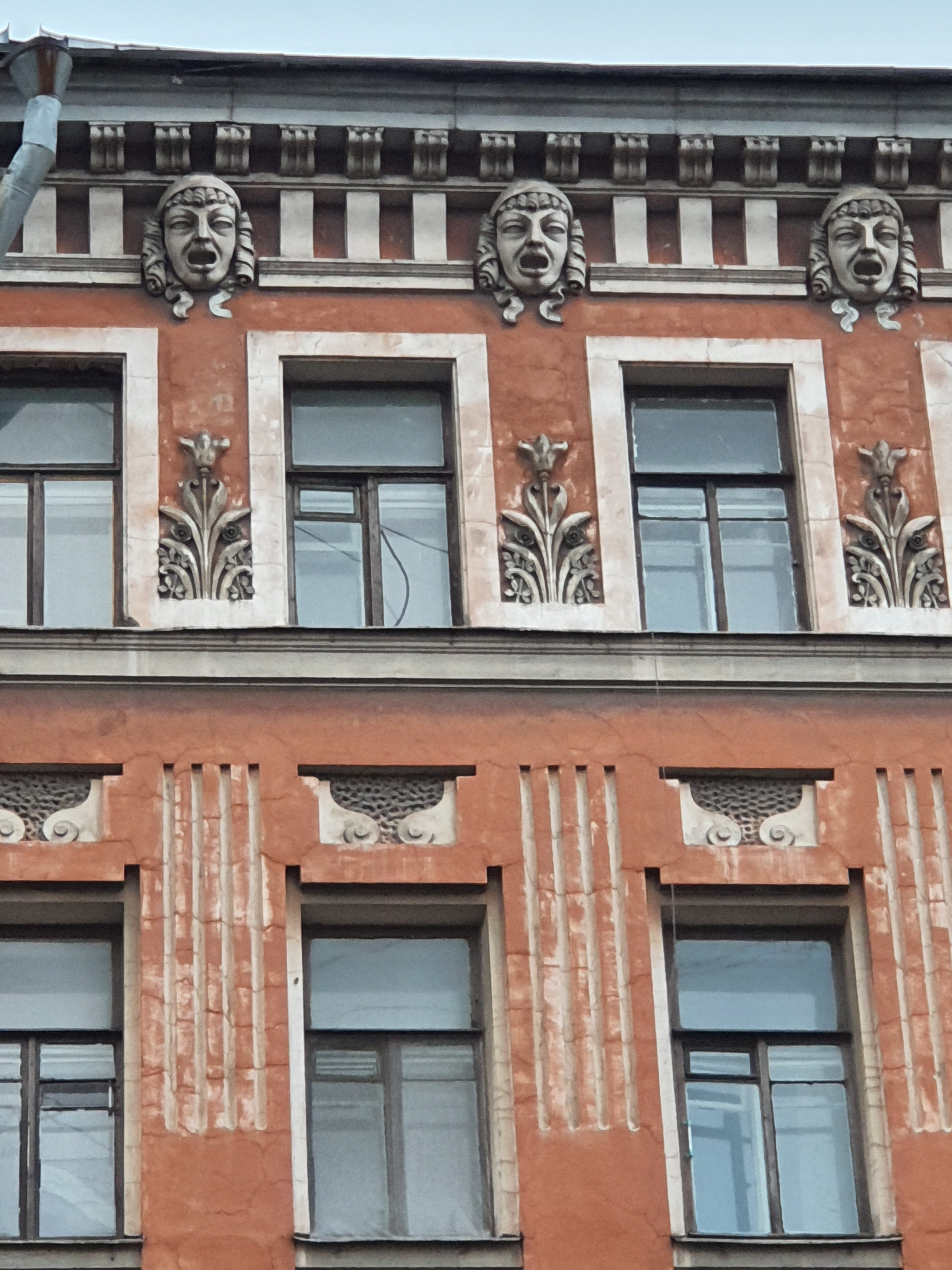 Дом А. Я. Барышникова в Санкт-Петербурге по адресу ул. Марата, 31. Арх-р А. А. Барышников, 1897-1899.